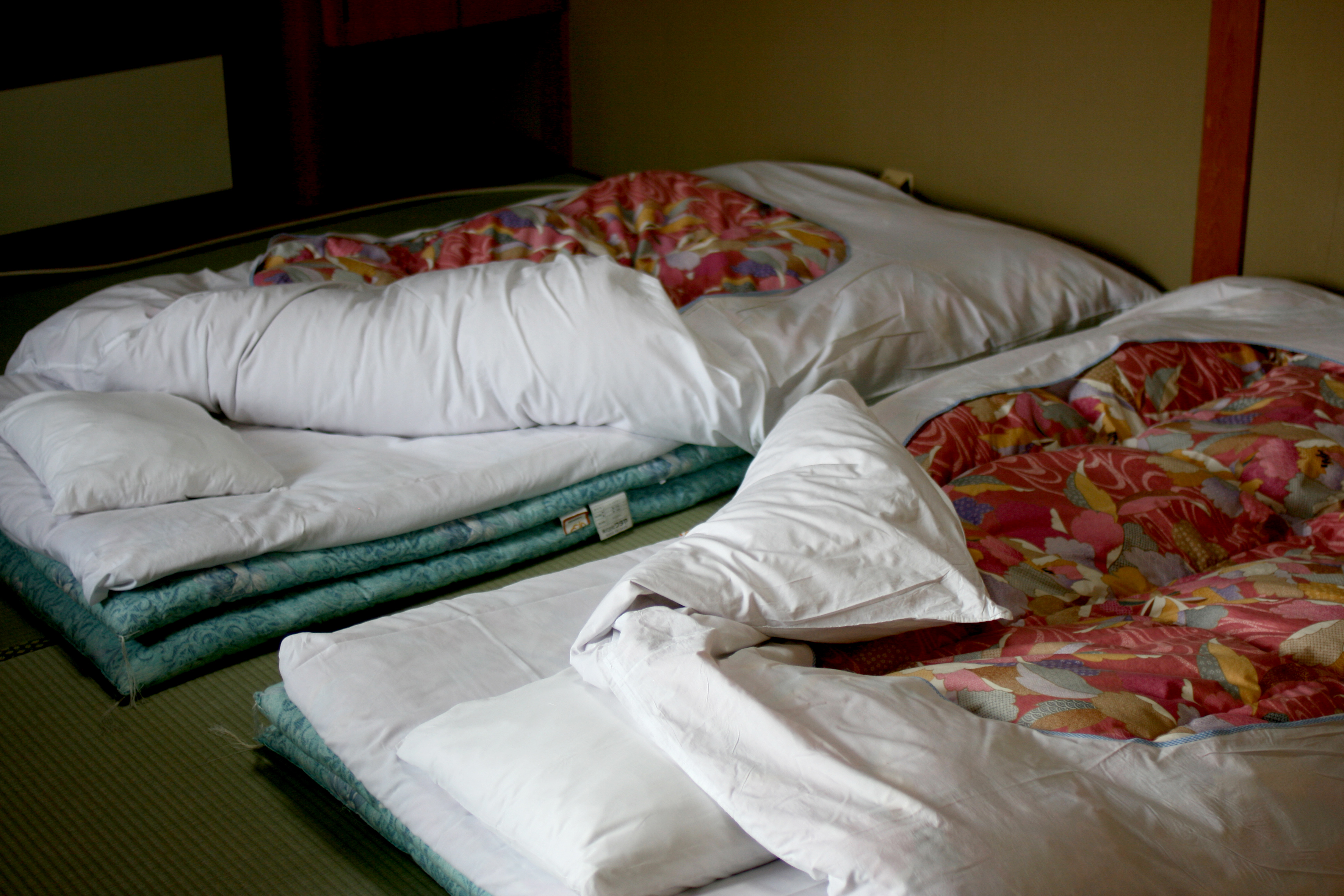 奈良市内の旅館の客室。